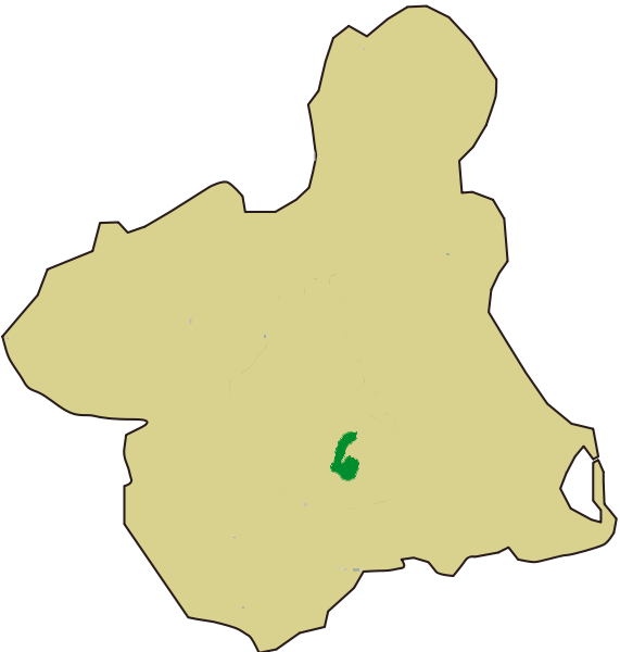 Localización de los saladares del Guadalentín